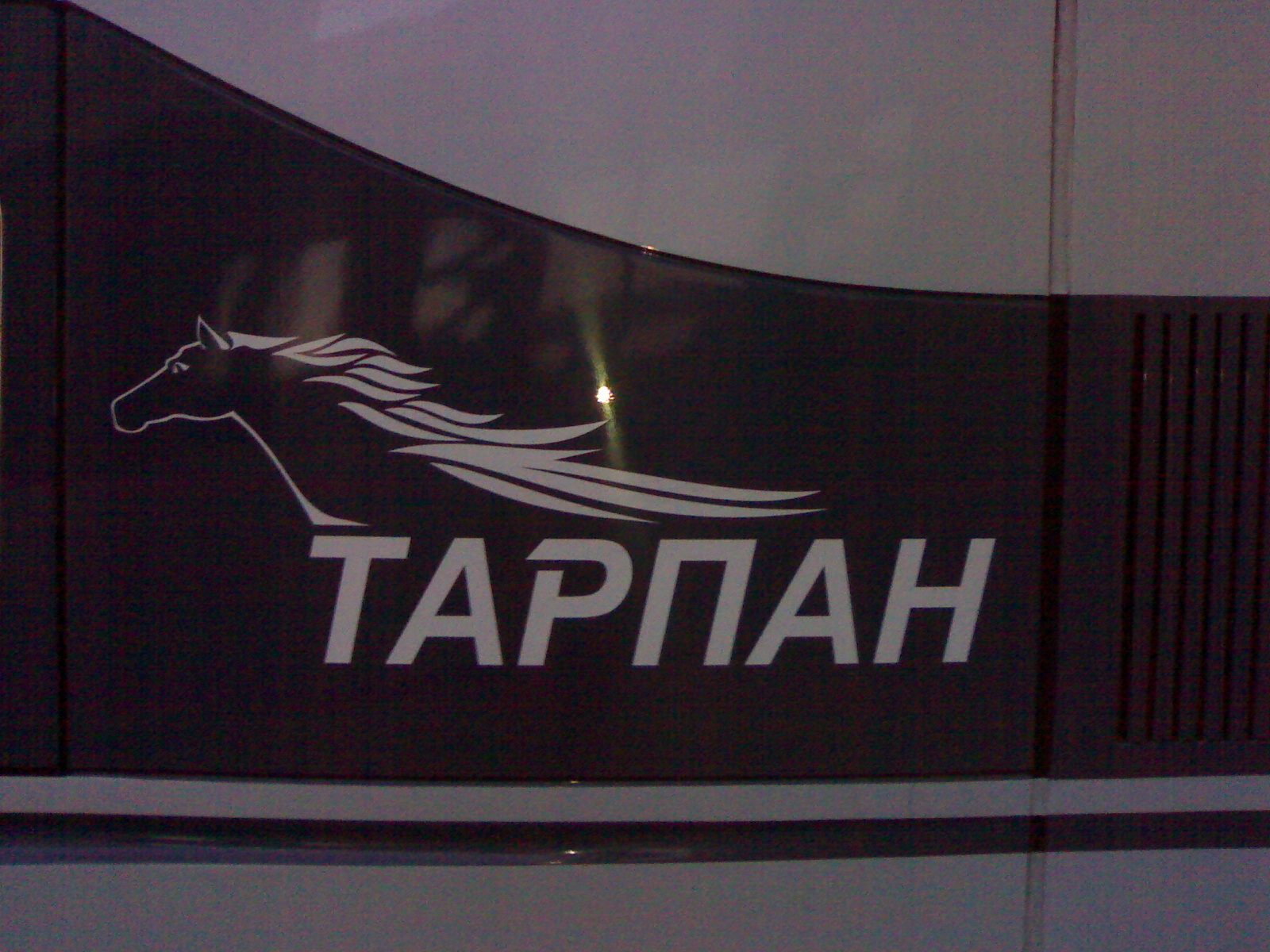 Скоростной єлектропоезд "Тарпан"